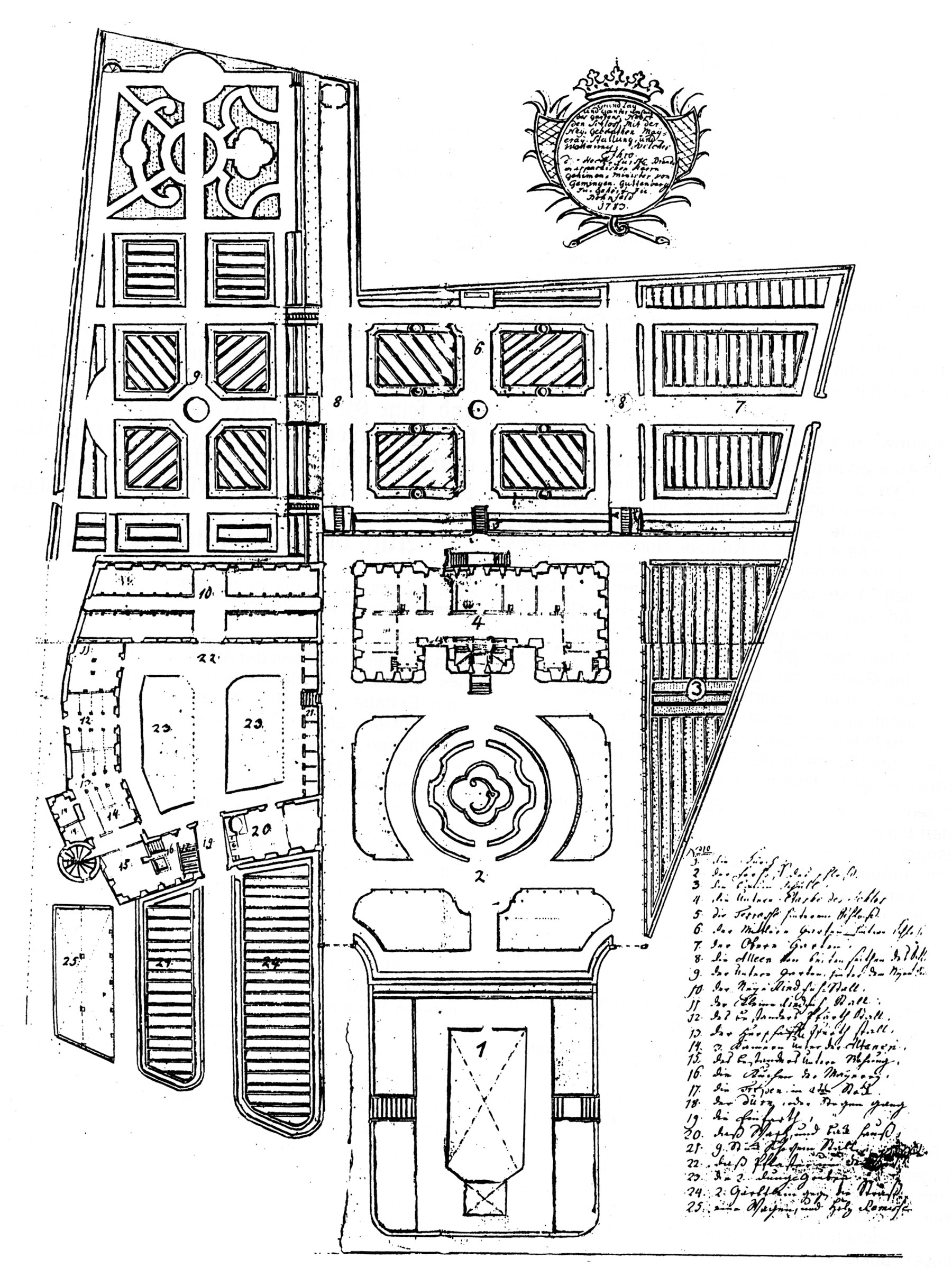 Schlossareal in Bonfeld 1783: 1 Kirche, 2 Vorhof des Schlosses, 3 Baumschule, 4 Oberschloss, 5 Schlossterasse, 6 mittlerer Garten hinter dem Schloss, 7 oberer Garten, 8 Alleen, 9 unterer Garten hinter dem neuen Stall, 10 neuer Rindviehstall, 11 kleiner Rindviehstall, 12, Pferdestall des Bestandspächters, 13 Pferdestall der Herrschaft, 14 drei Kammern unter der Altane, 15 untere Wohnung des Beständers, 16 Küche der Meirei, 17 Treppe, 18 Turm- oder Stiegengang, 19 Einfahrt, 20 Wasch- und Backhaus, 21 neun Schweineställe, 22 gepflasterter Hof, 23 zwei Dunggruben, 24 zwei Gärten, 25 Wagen- und Holzremise